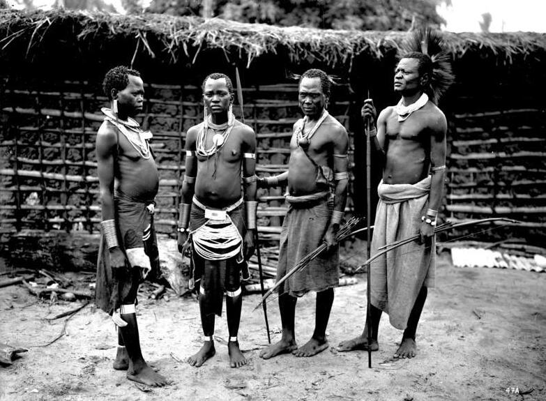 Wagogo der nördl. Grenzgebiete Ugoyos